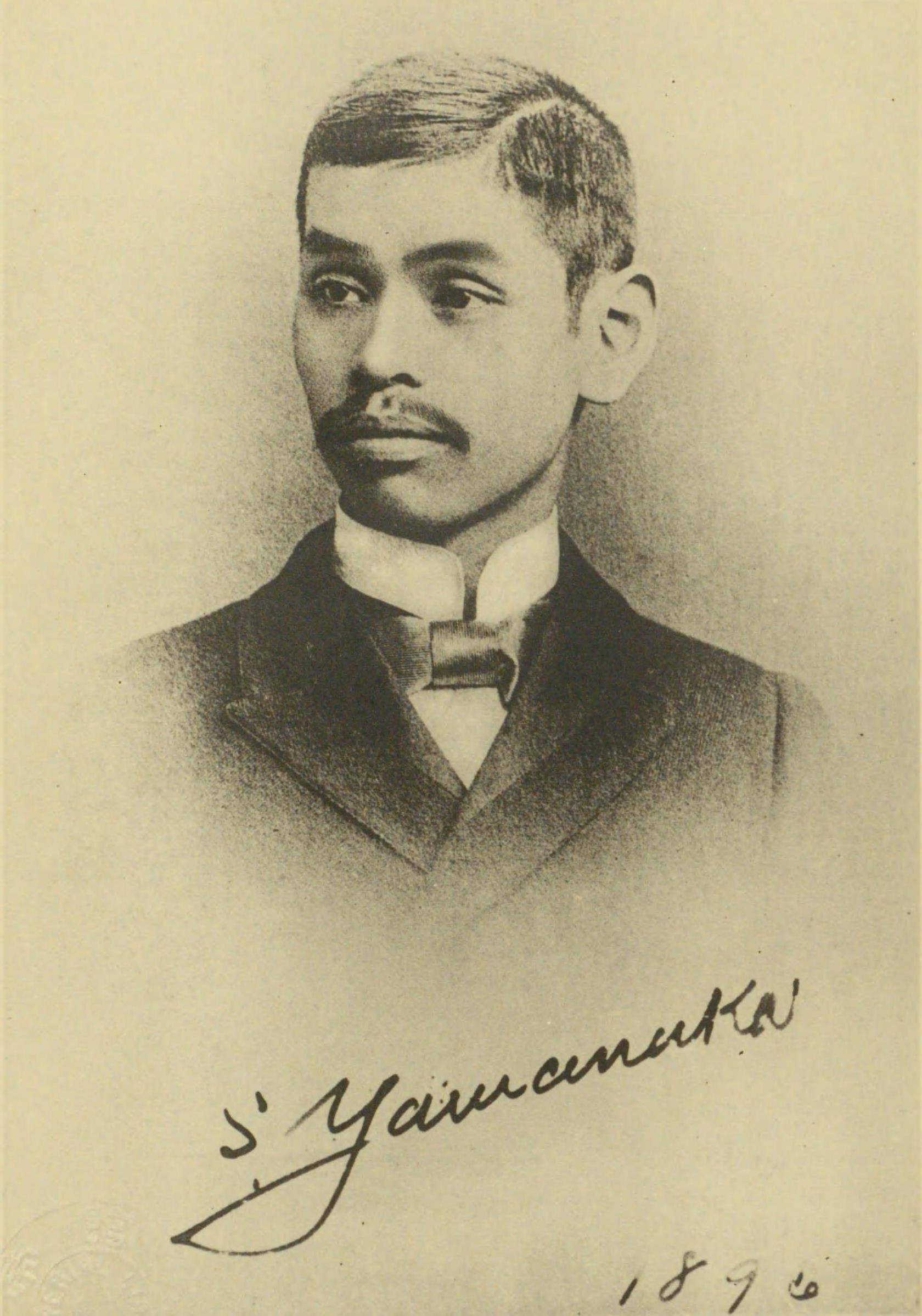 青年時代の山中定次郎 明治29年撮影